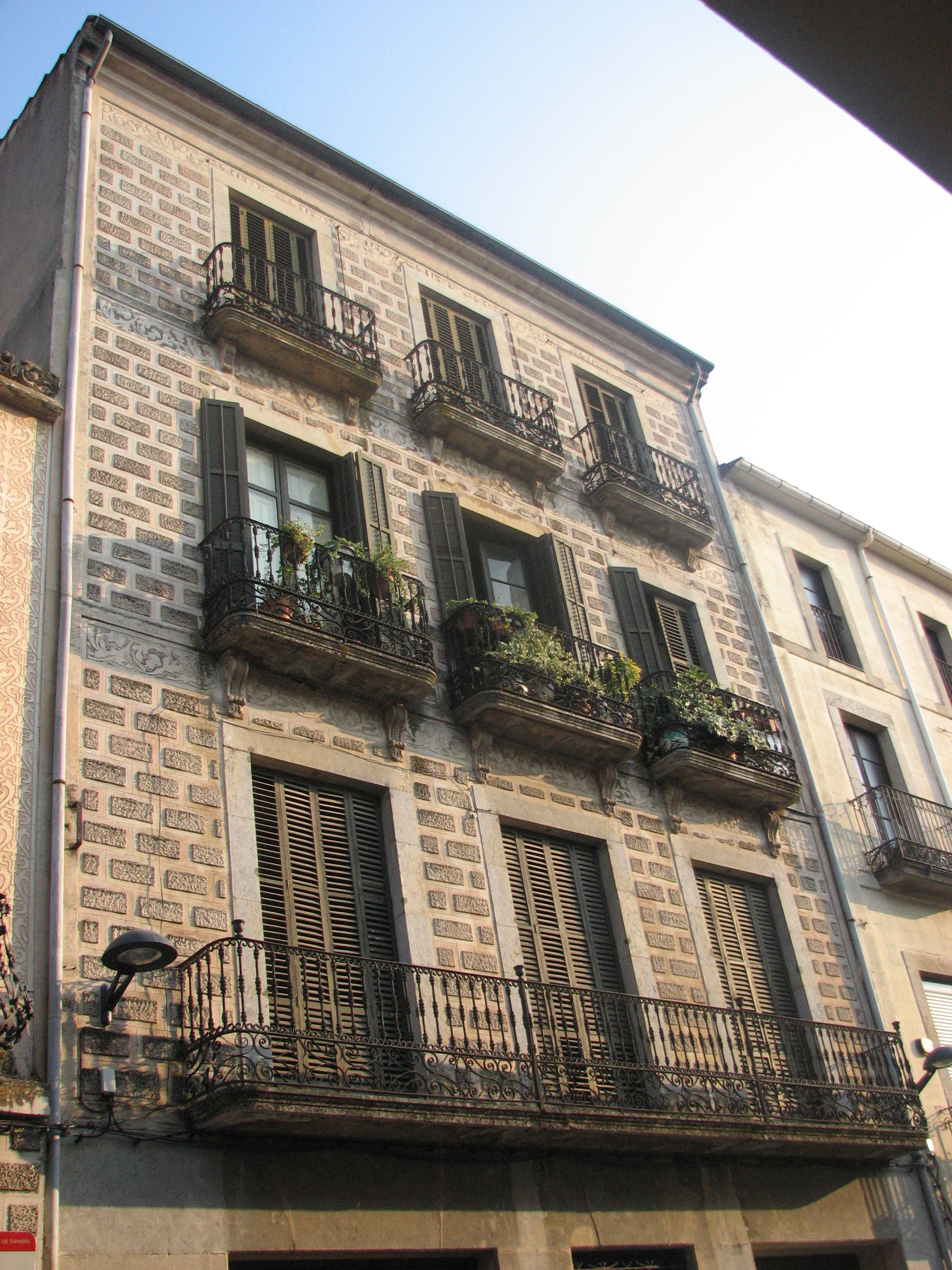 Casa al carrer Major, 21 (Santa Coloma de Farners)